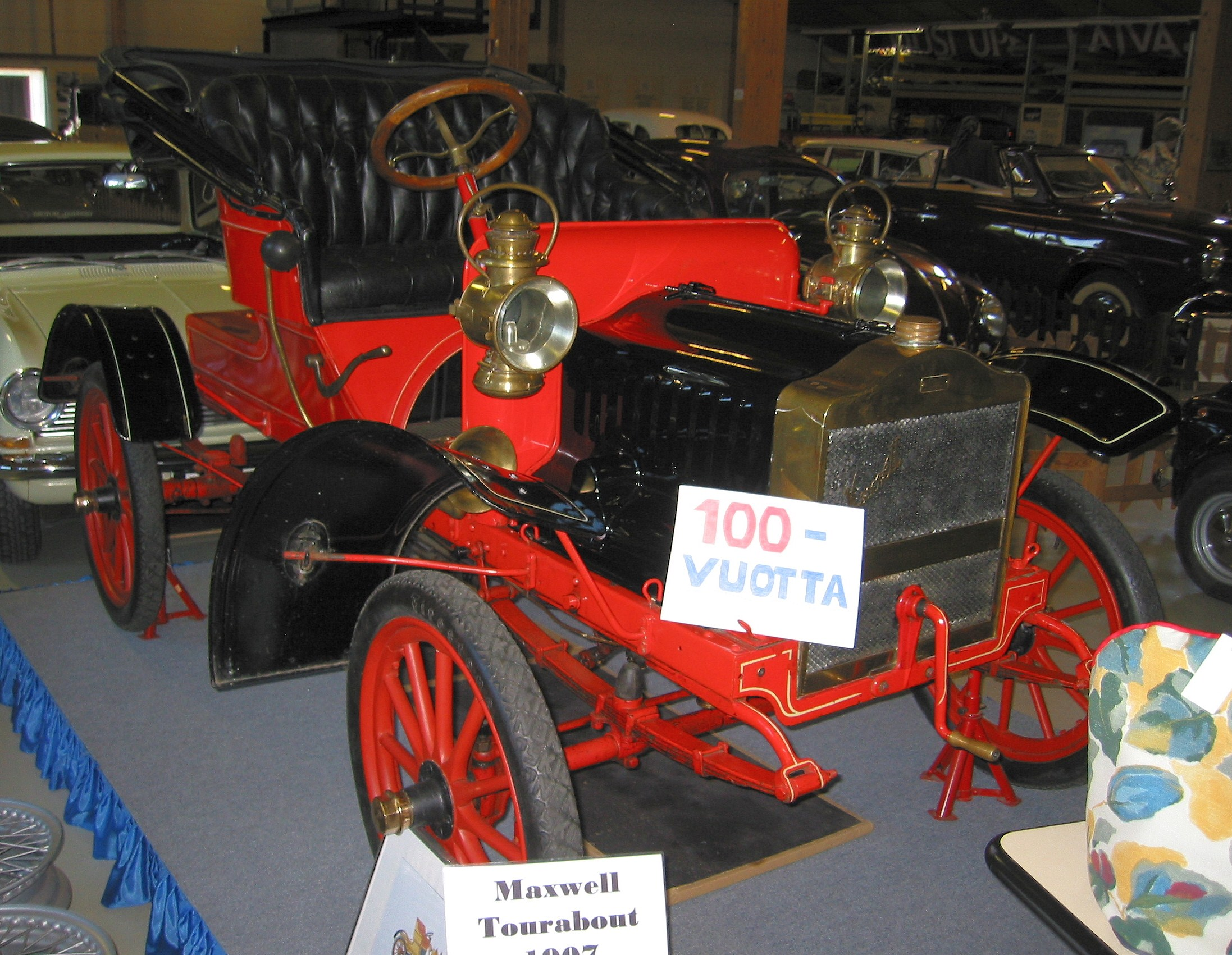 Maxwell von 1907 im Automuseum von Uusikaupunki